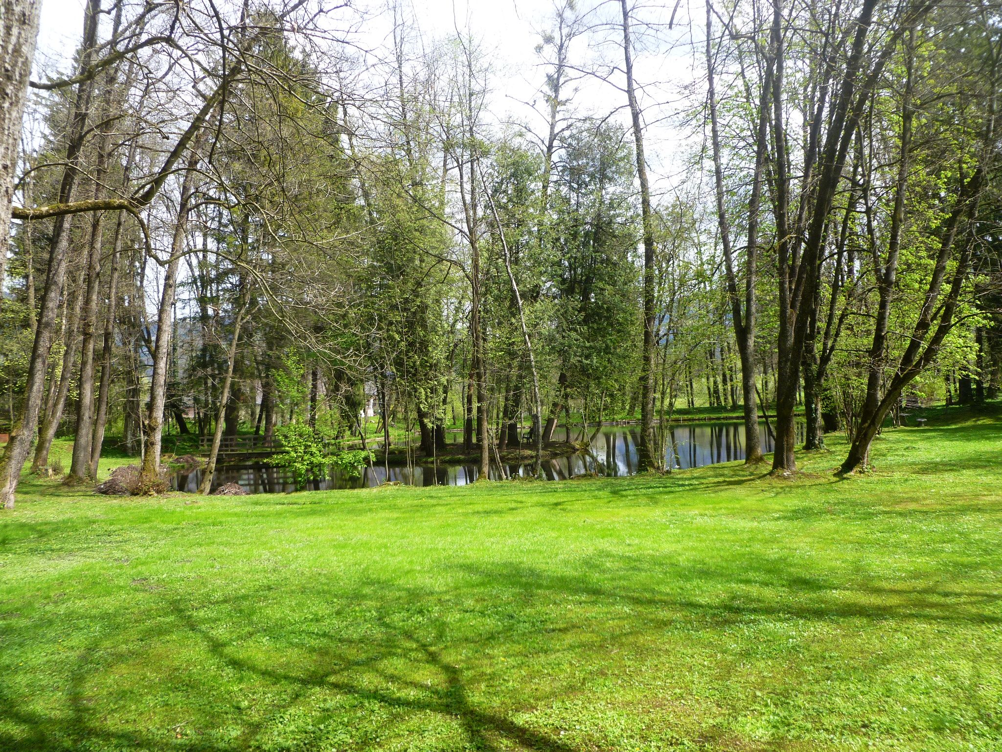 Hotel Restaurant Maria Theresien-Schlössl